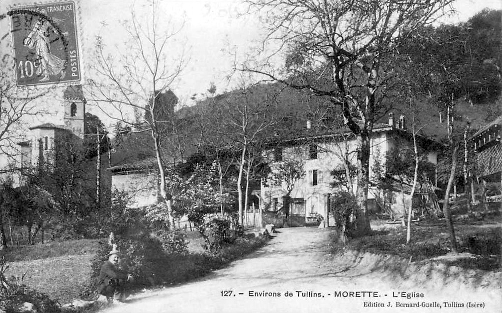 environs de Tullins (Isère). Eglise de Morette. Carte postale ancienne.